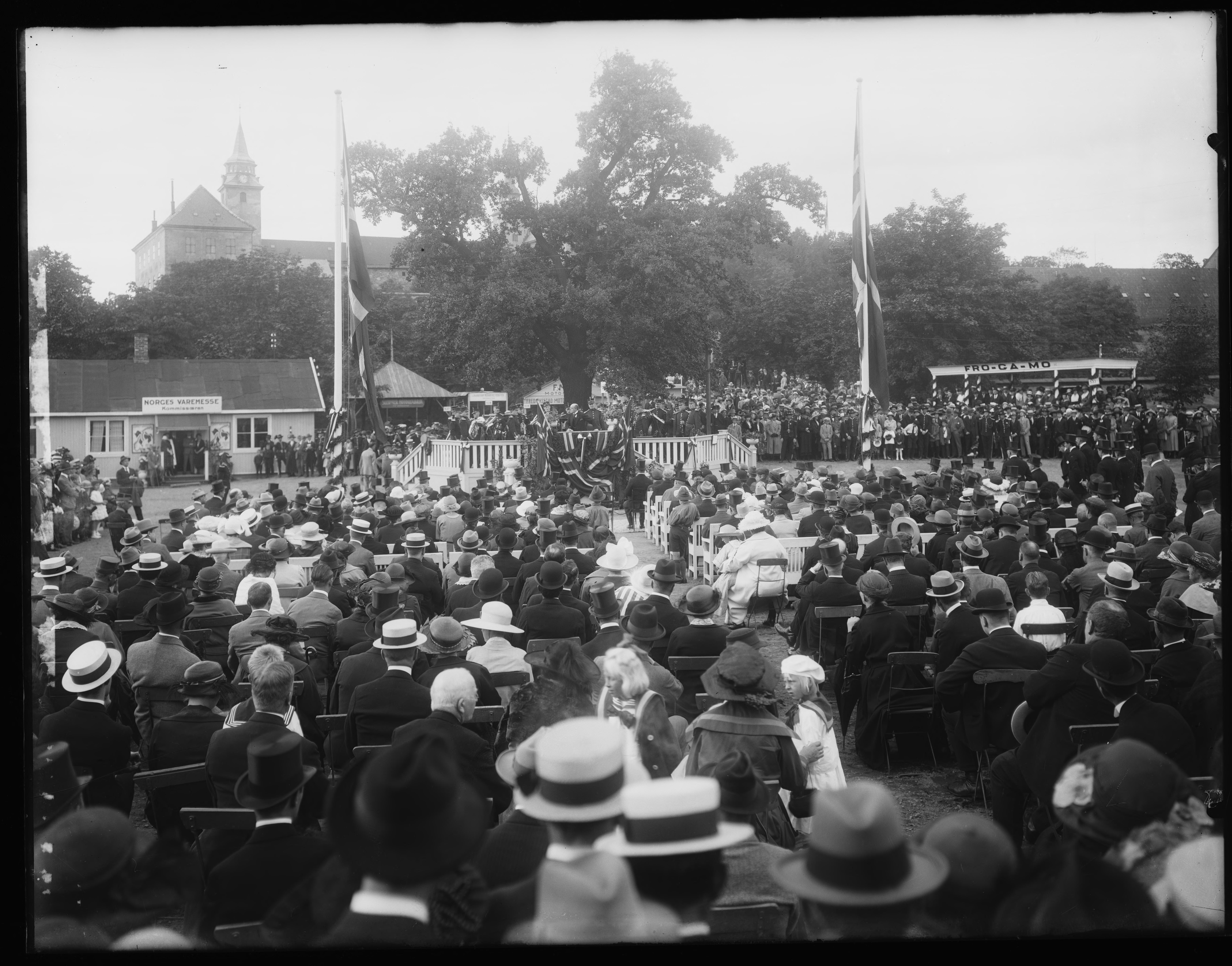 Bildet er hentet fra Nasjonalbibliotekets bildesamling. Anmerkninger til bildet var: Påskrift arkivark: Norges Varemesse 1922 Eldste arkivnummer: 692 Oslo, Oslo, Oslo